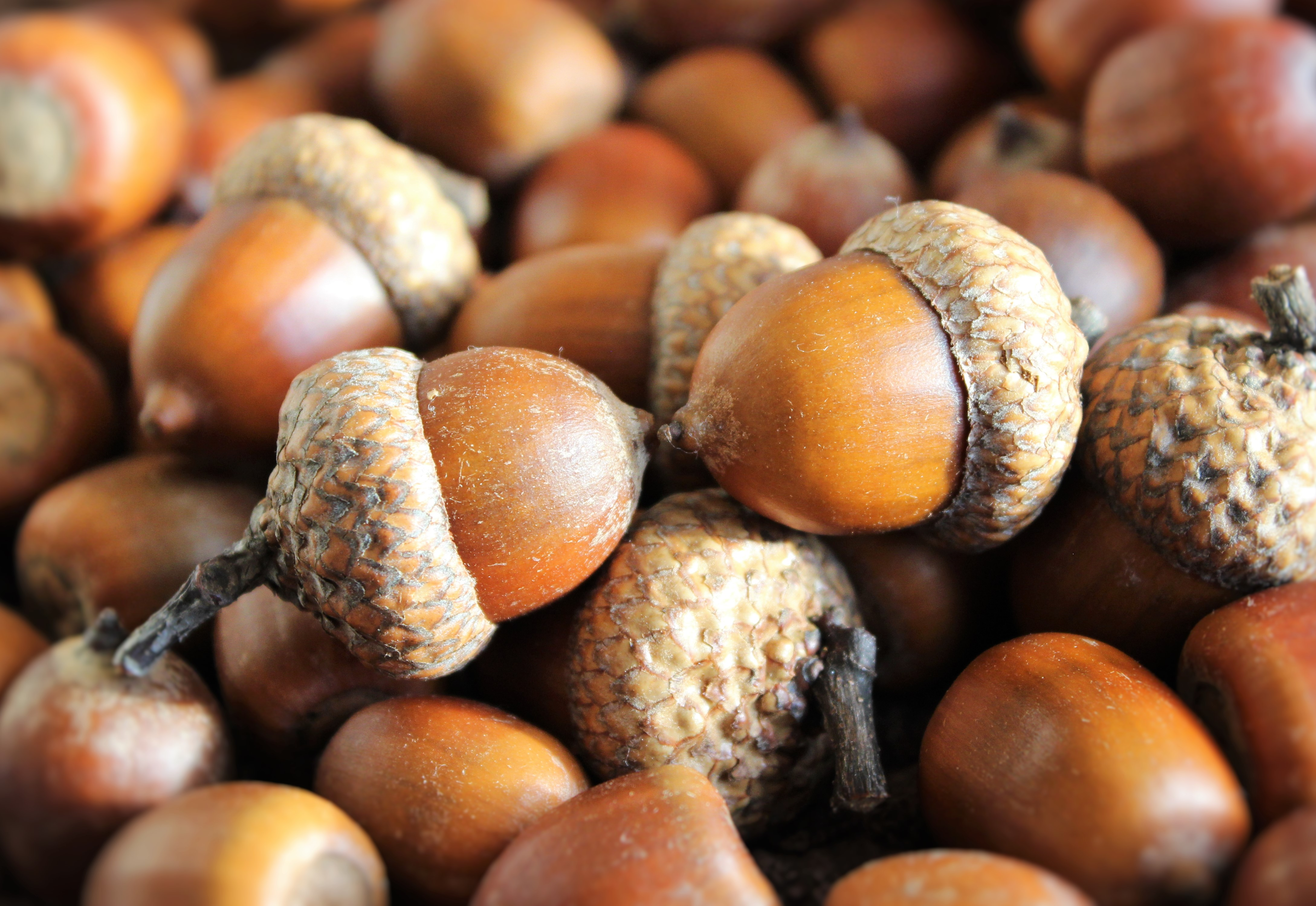 Желуди красного дуба(лат. Quércus rúbra).